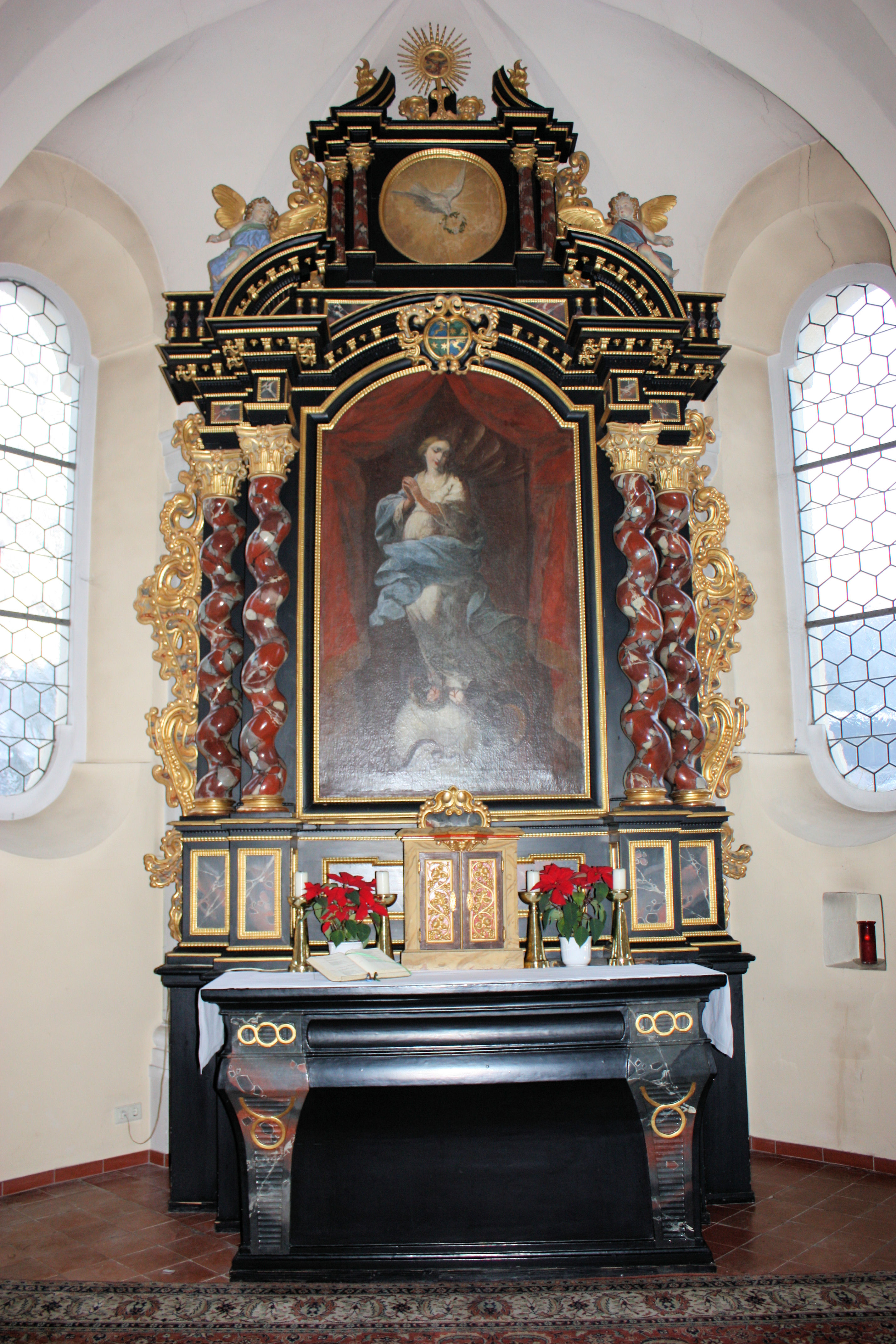 Johann Christoph Feinlein: Altar der Schloßkapelle Gurtweil, 1662